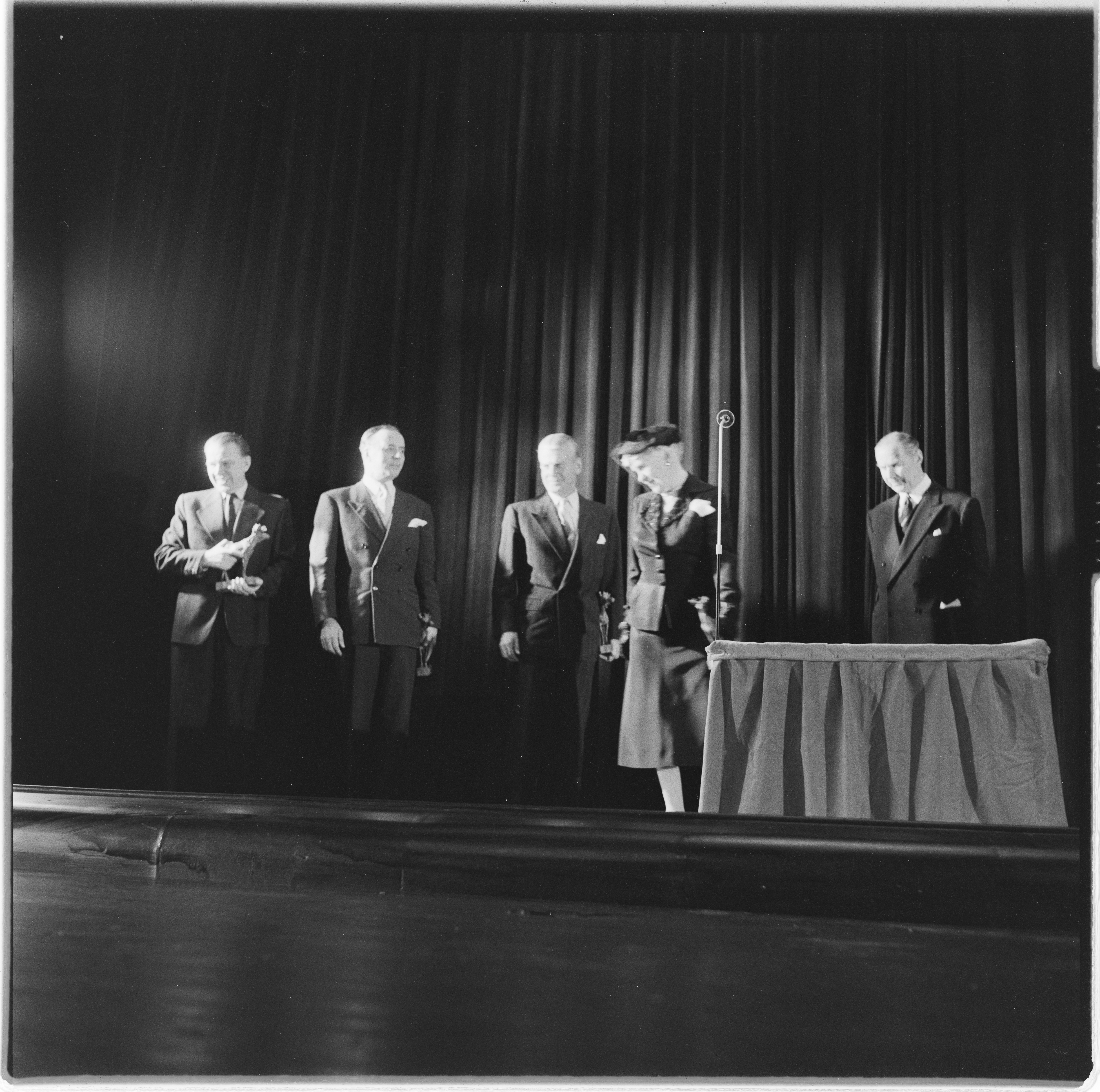 Bildet er hentet fra Arkivverket. Åmodt-prisen til Kr. Åmodt, Tancred Ibsen, Alfred Maurstad og Kåre Bergstrøm. NÅ nr. 43, 1955. Arkivinstitusjon : Riksarkivet Arkivnavn : Billedbladet NÅ Sted : Norge, Oslo, Oslo, Klingenberg kino Emneord: prisutdeling Avbildet: Ibsen, Tancred;Maurstad, Alfred;Bergstrøm, Kåre